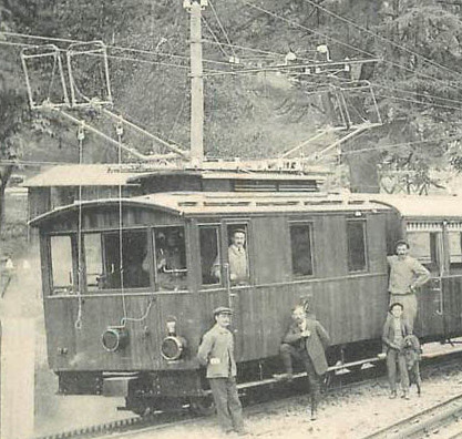 Ansichtskarte der Bergbahn Luchon–Superbagnères. Zug im Bahnhof von Luchon. Lok mit zwei Beistellwagen für zusammen 120 Fahrgäste. Hersteller der Lok: SLM (mechanischer Teil) und BBC (elektrischer Teil).